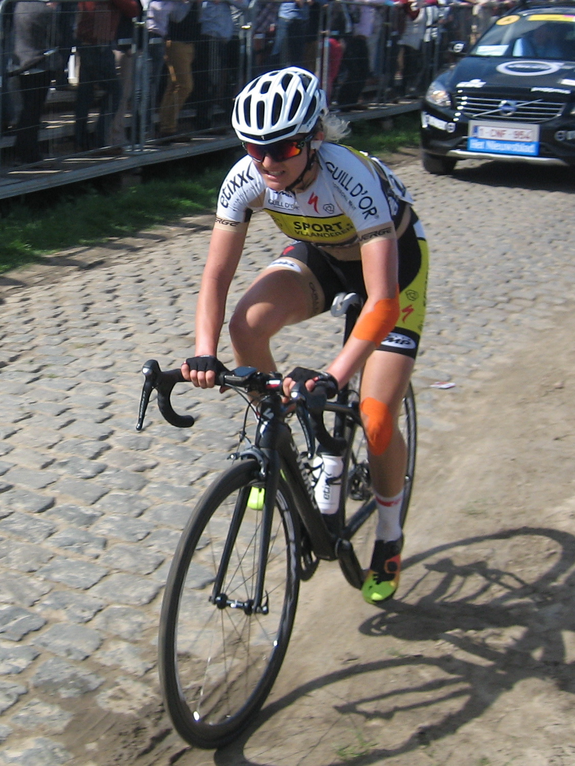 Sport Vlaanderen op de Oude Kwaremont in de Ronde van Vlaanderen voor vrouwen 2017.